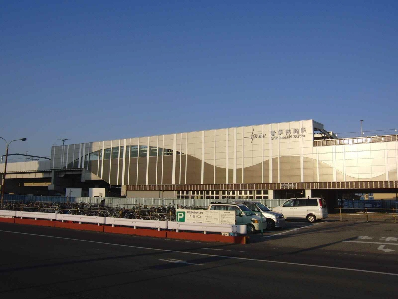 東武鉄道の新伊勢崎駅の駅舎です。